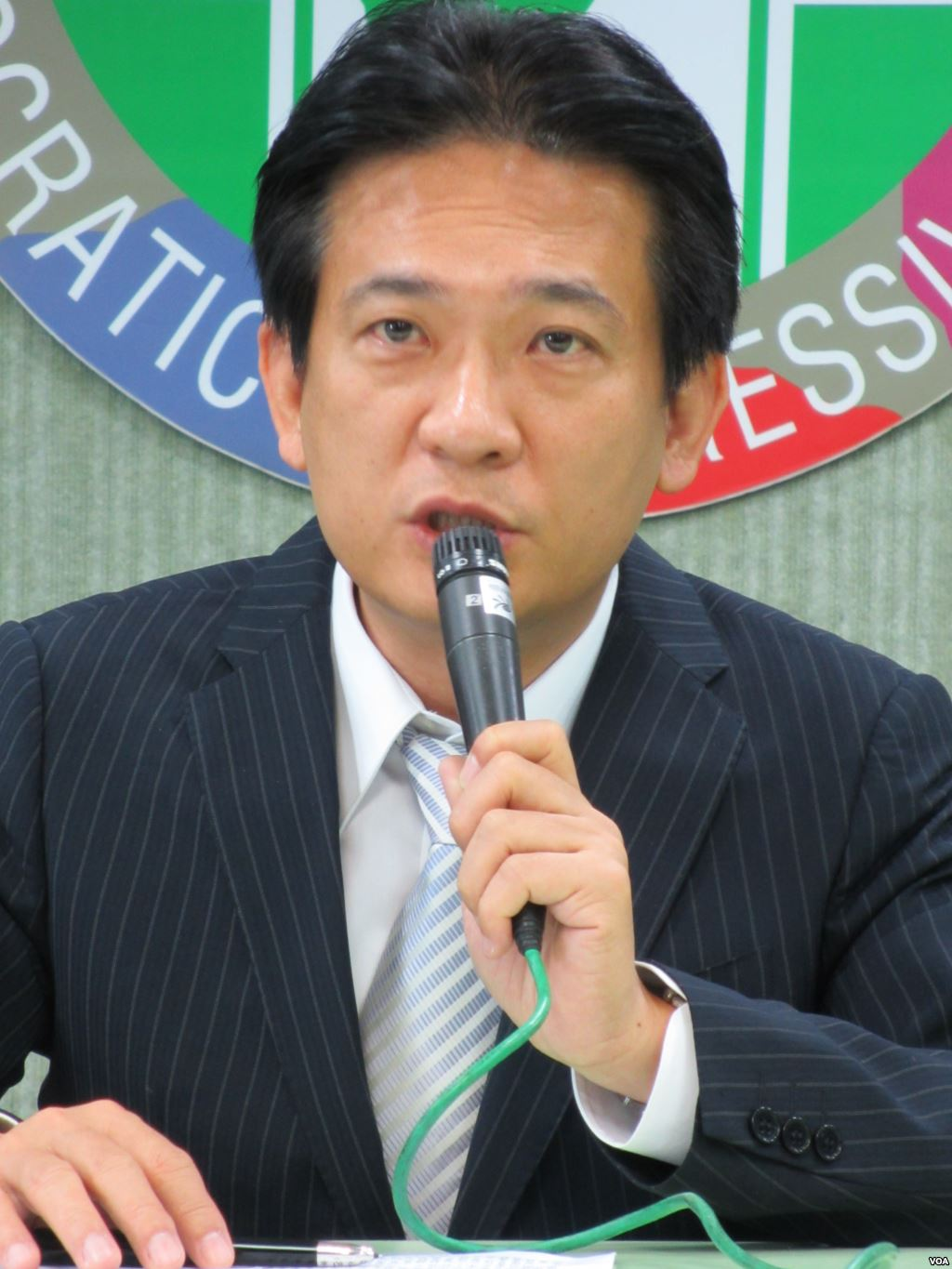 中文（台灣）: 民進黨發言人林俊憲